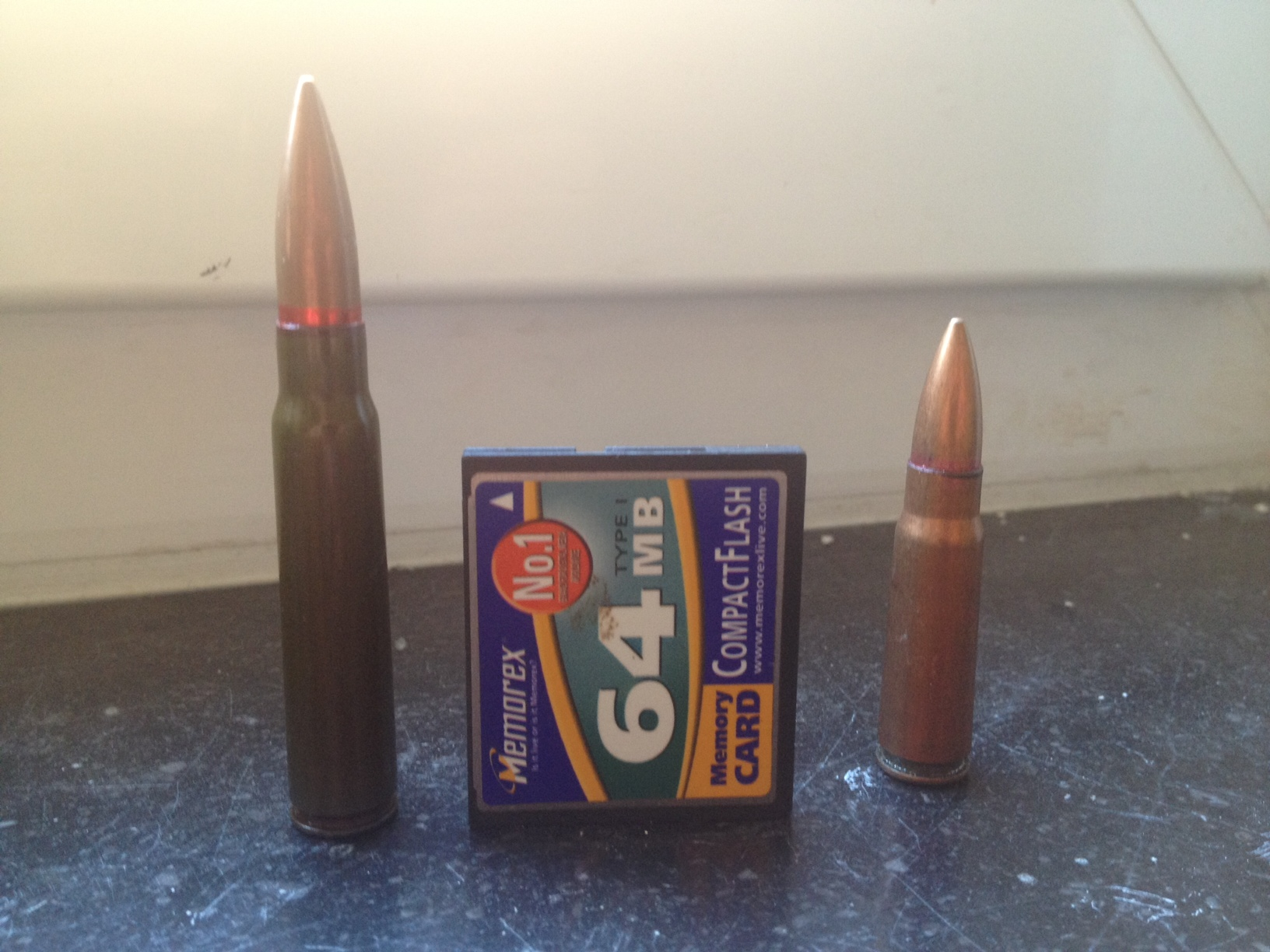 Comparaison d'une cartouche 8mm Mauser avec une cartouche 7,62x39 à une carte compact flash de 4,3mm de hauteur.